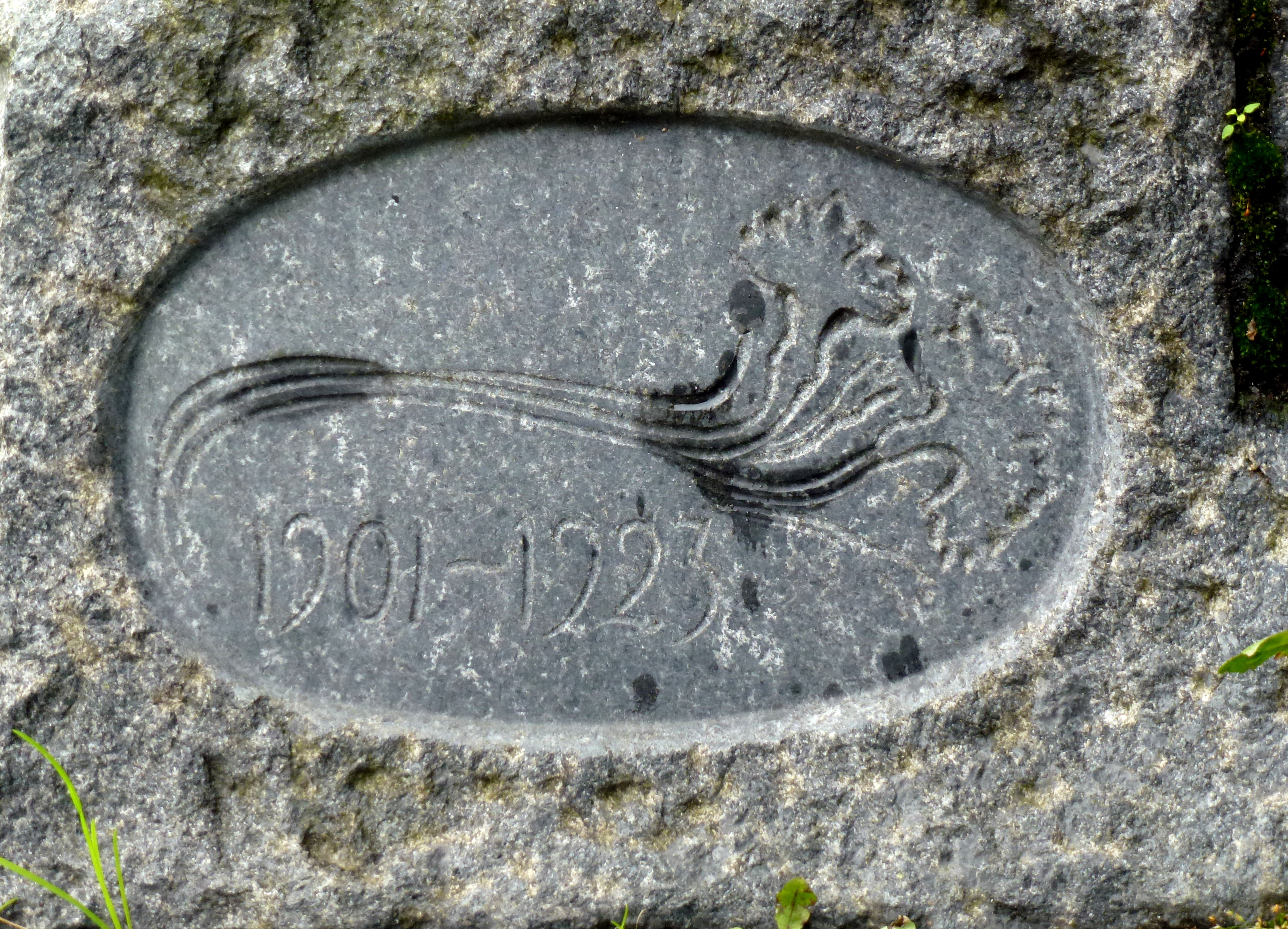 Ragnar Östbergs signatur på västra portföljaren